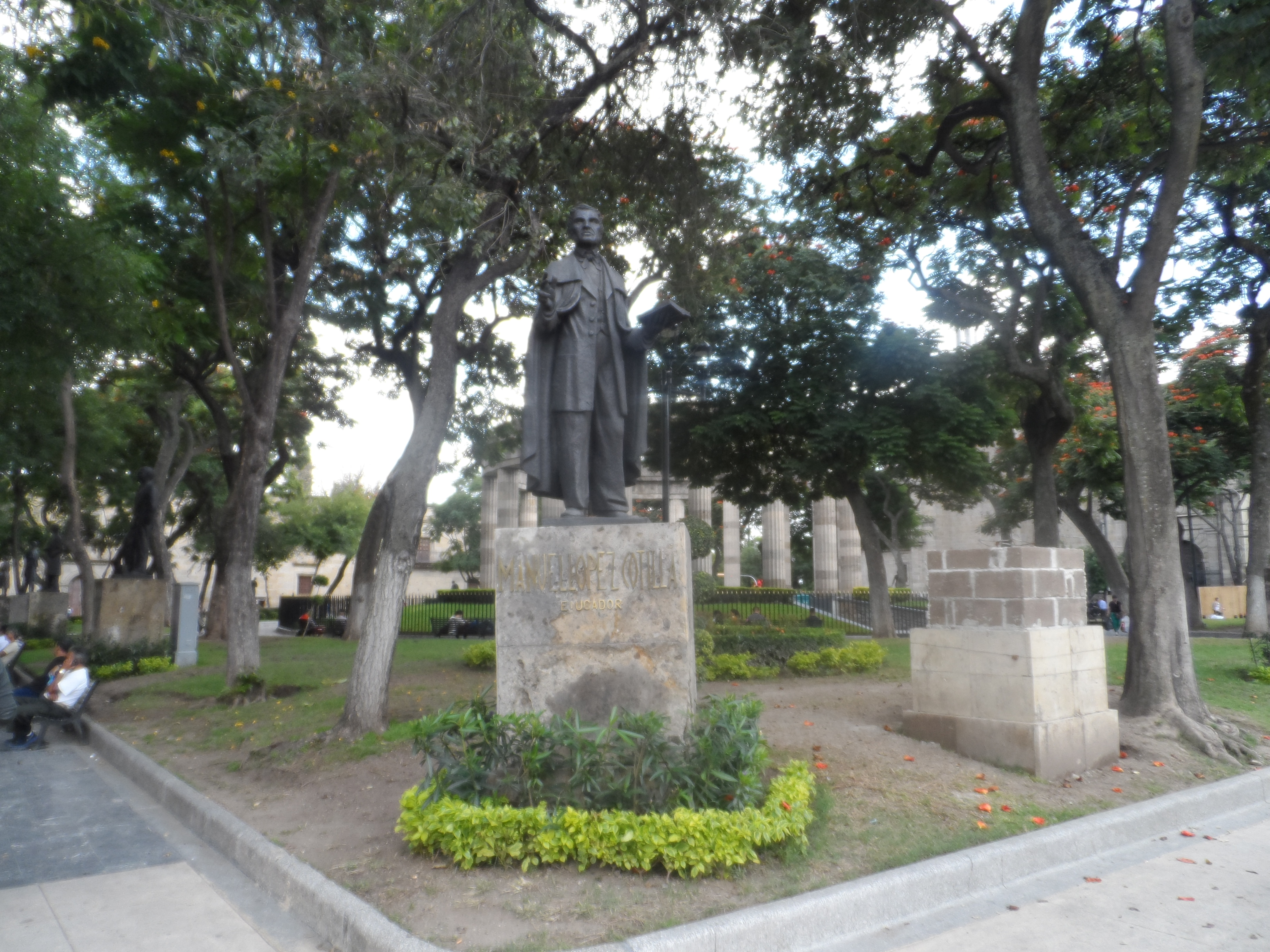 Estatua del profesor jalisciense Manuel López Cotilla en la "Rotonda de los Jaliscienses Ilustres".